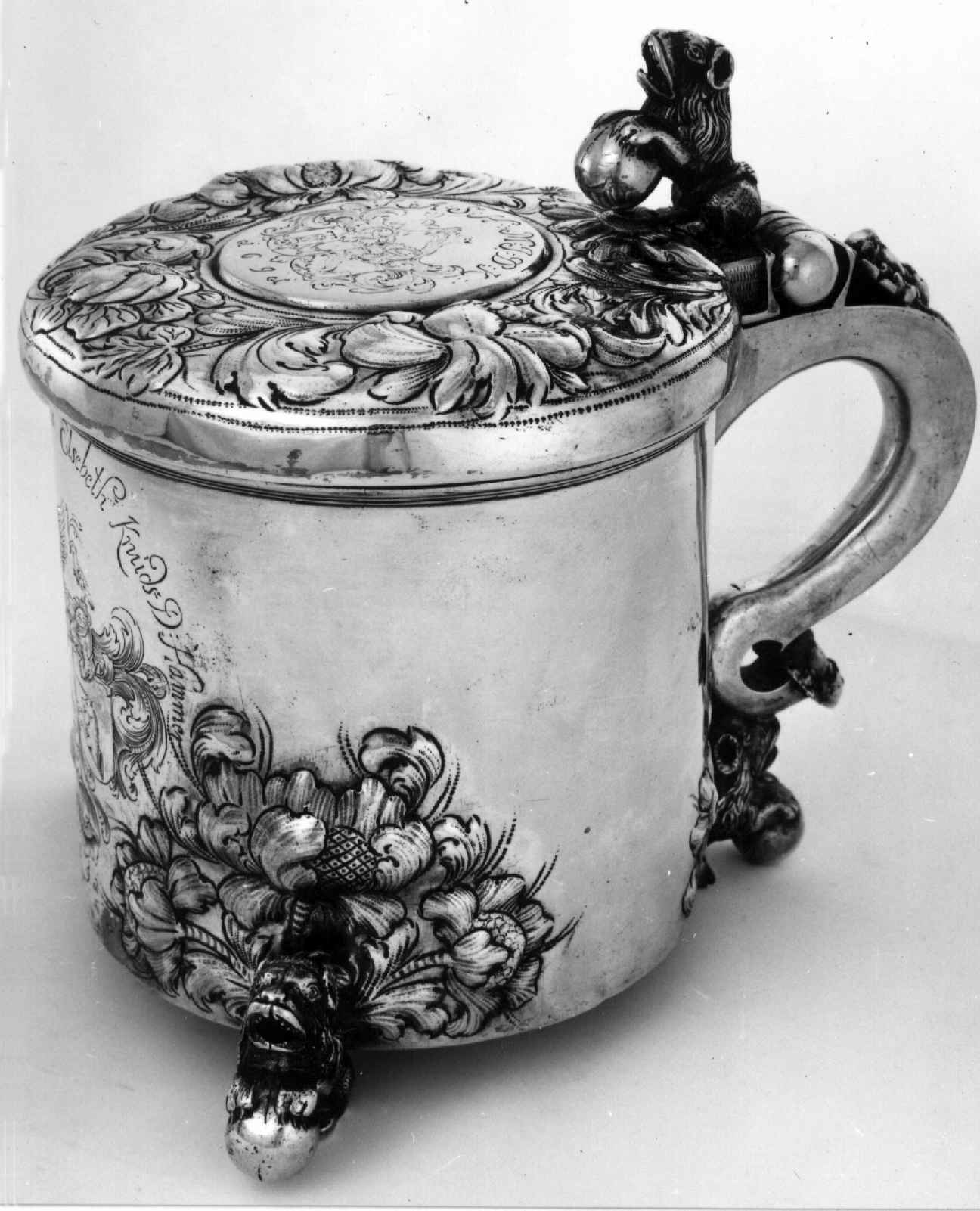 Drikkekanne av sølv datert 1691 og laget av Knud Olufsen Wulf, Bragernes (Drammen). Høyde 20 cm. Norsk Folkemuseum. NF.1950-0001.